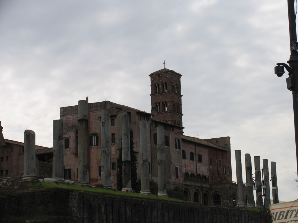 Tempio di venere e chiesa di santa Francesca Romana al Foro, Roma, Italia